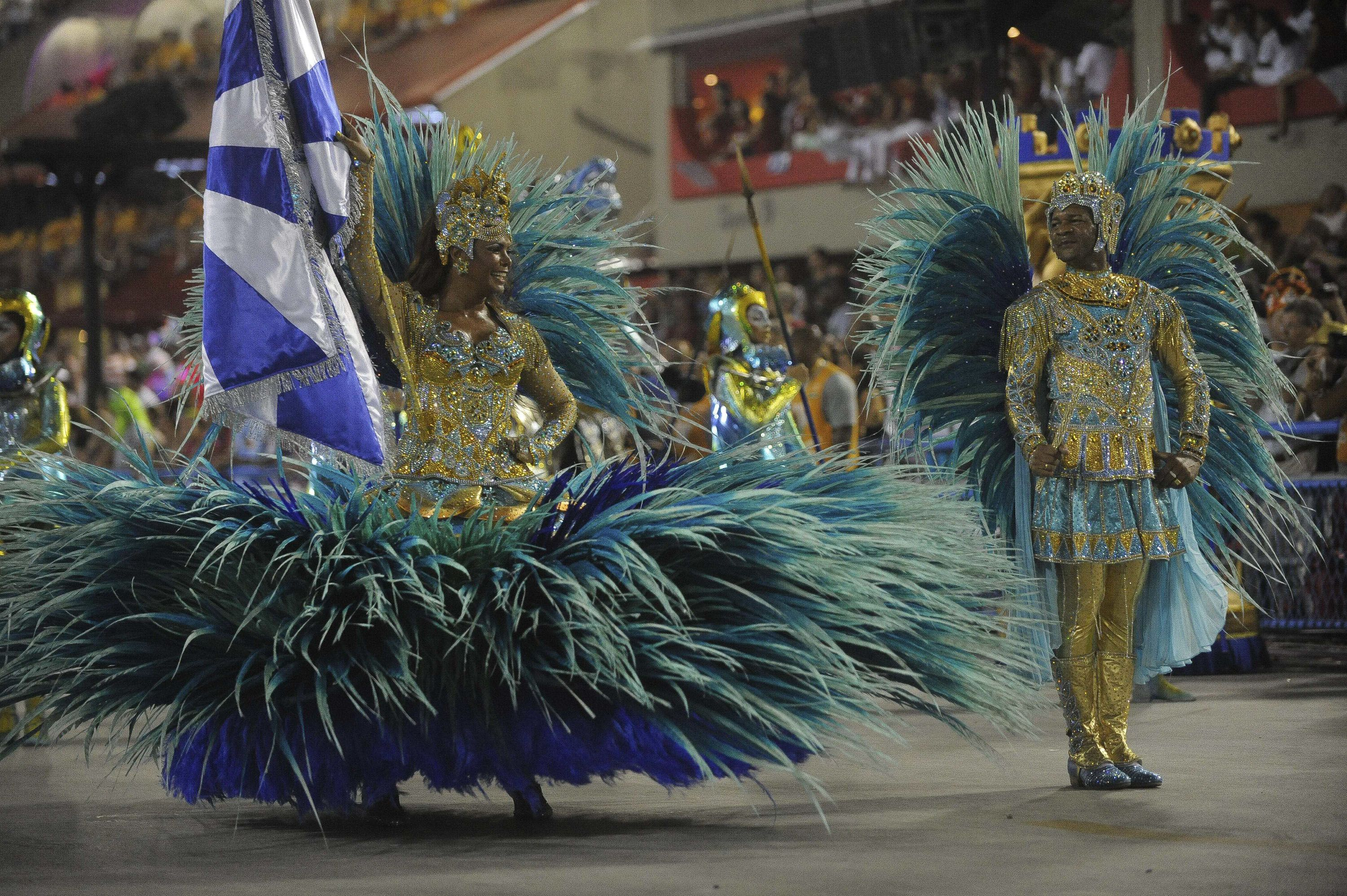 Rio de Janeiro - Escolas de samba do Grupo Especial se apresentam no Sambódromo da Marquês de Sapucaí, no primeiro dia de desfiles (Fernando Frazão/Agência Brasil)